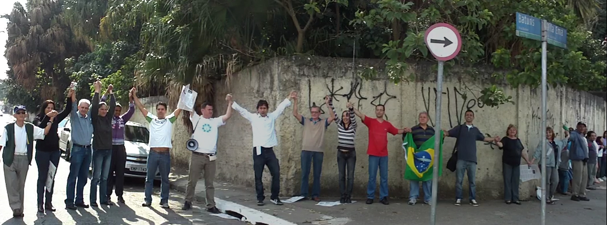 Abraço ao Parque Vila Ema